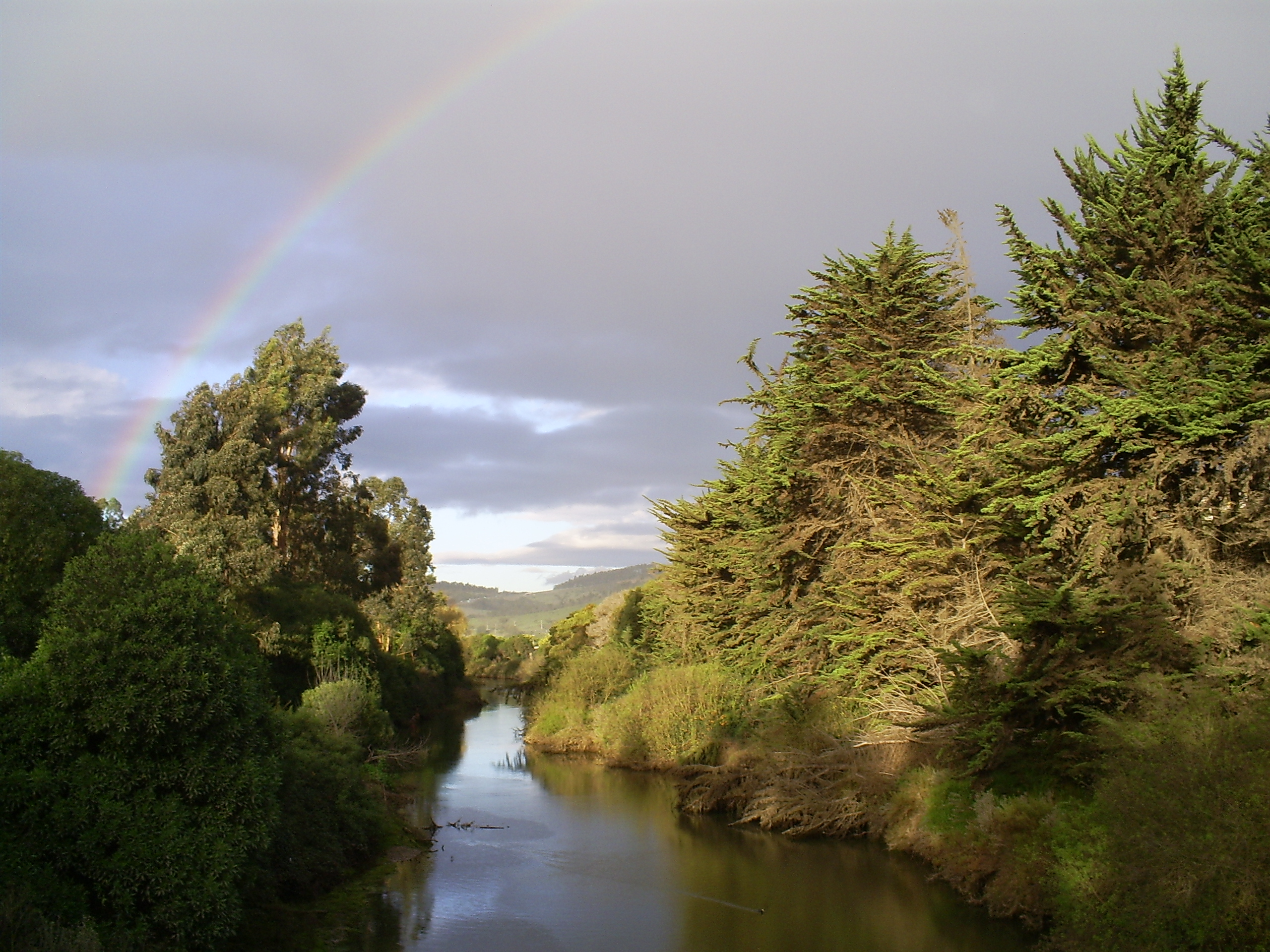 puente de san sebastian - despues del temporal